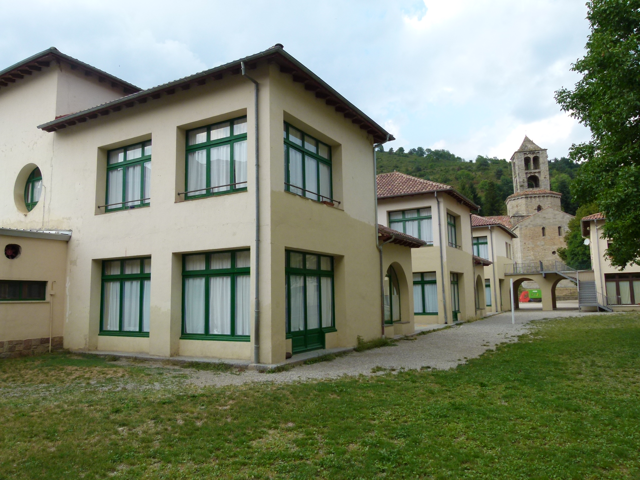 Escoles Doctor Robert (Camprodon)